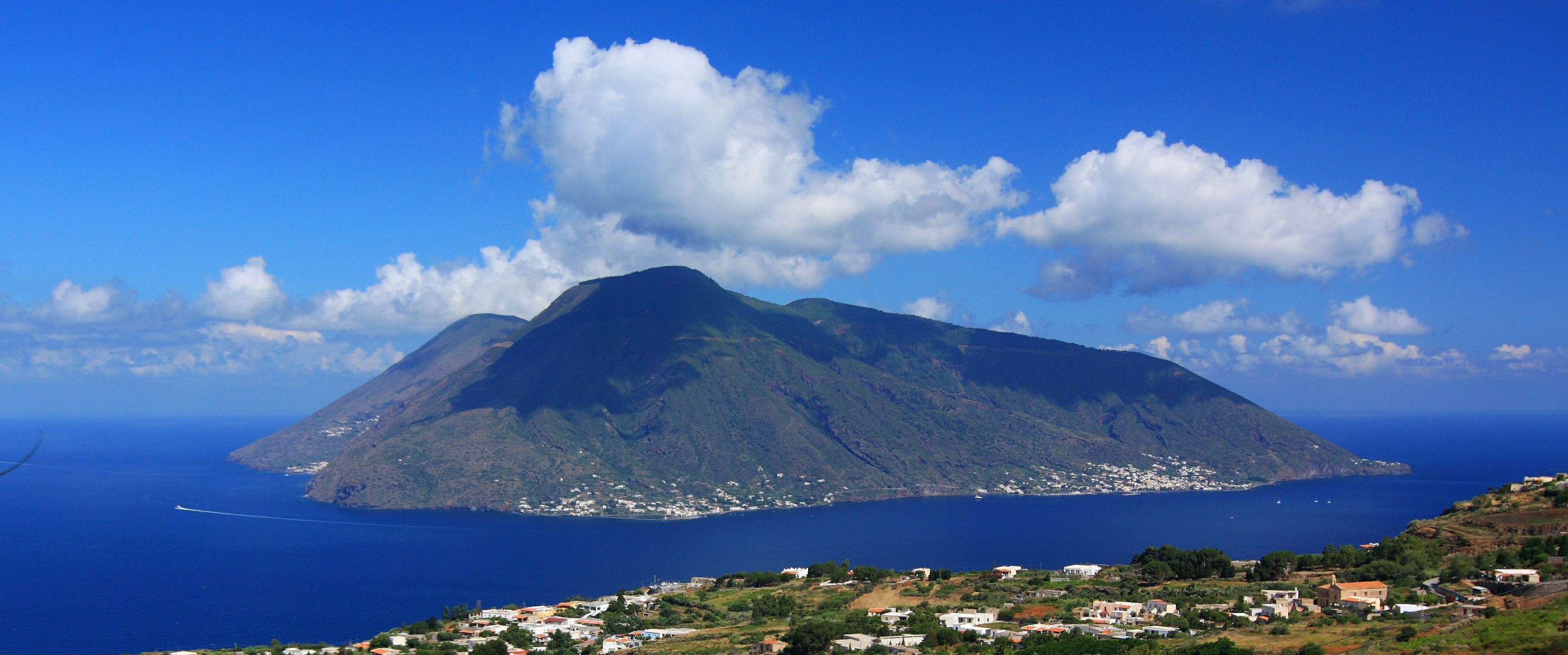 L'isola di Salina vista da Lipari